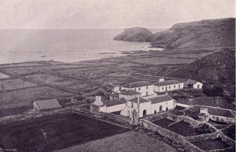 "Ermida e logar de Nossa Senhora dos Anjos", freguesia e concelho de Vila do Porto, ilha de Santa Maria, in Álbum Açoriano, fascículo nº 36, 1903, p. 288.